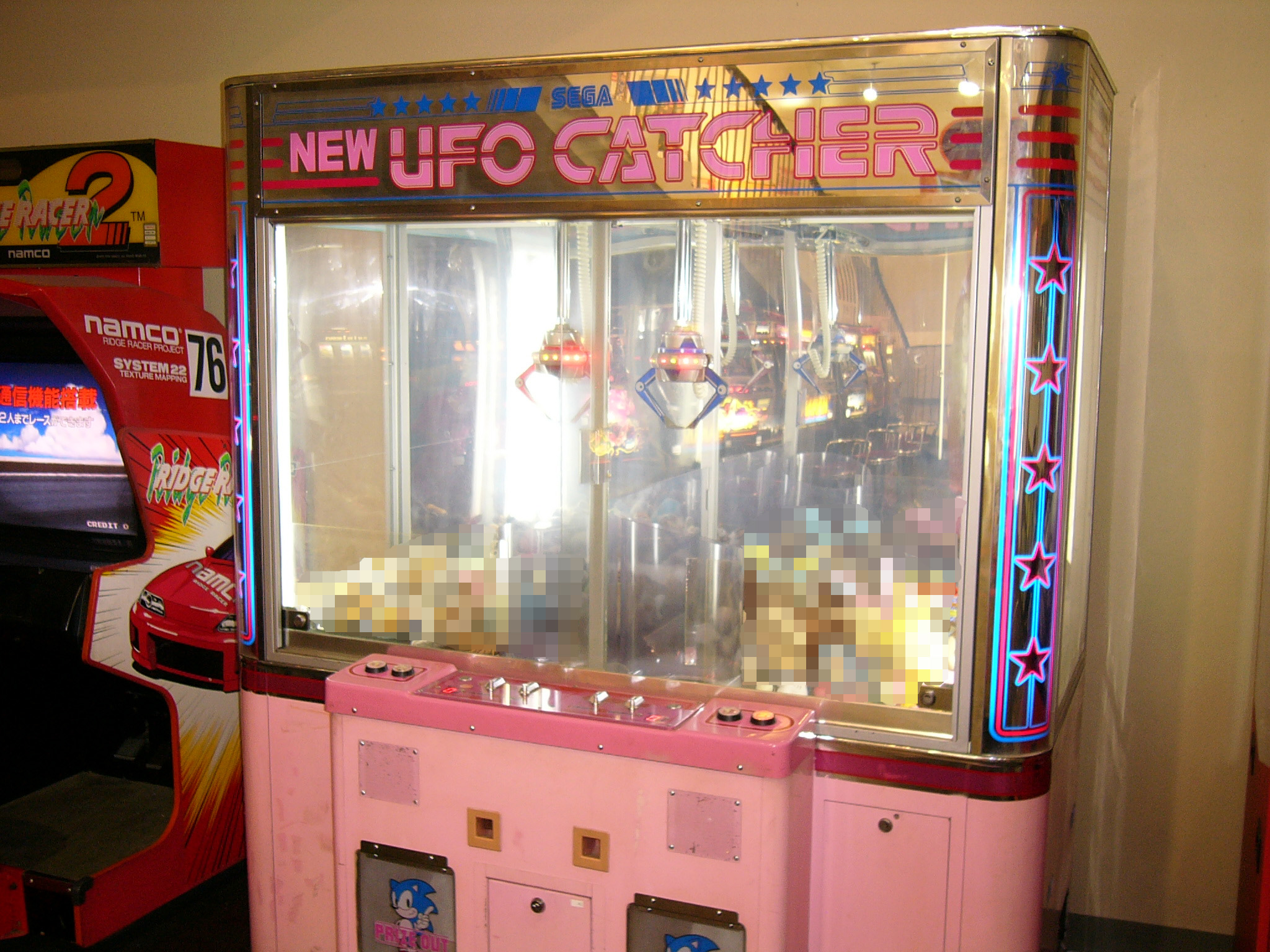 NEWUFOキャッチャー筐体、中に入っている景品類は著作権に問題がありそうなのでモザイク処理してます。